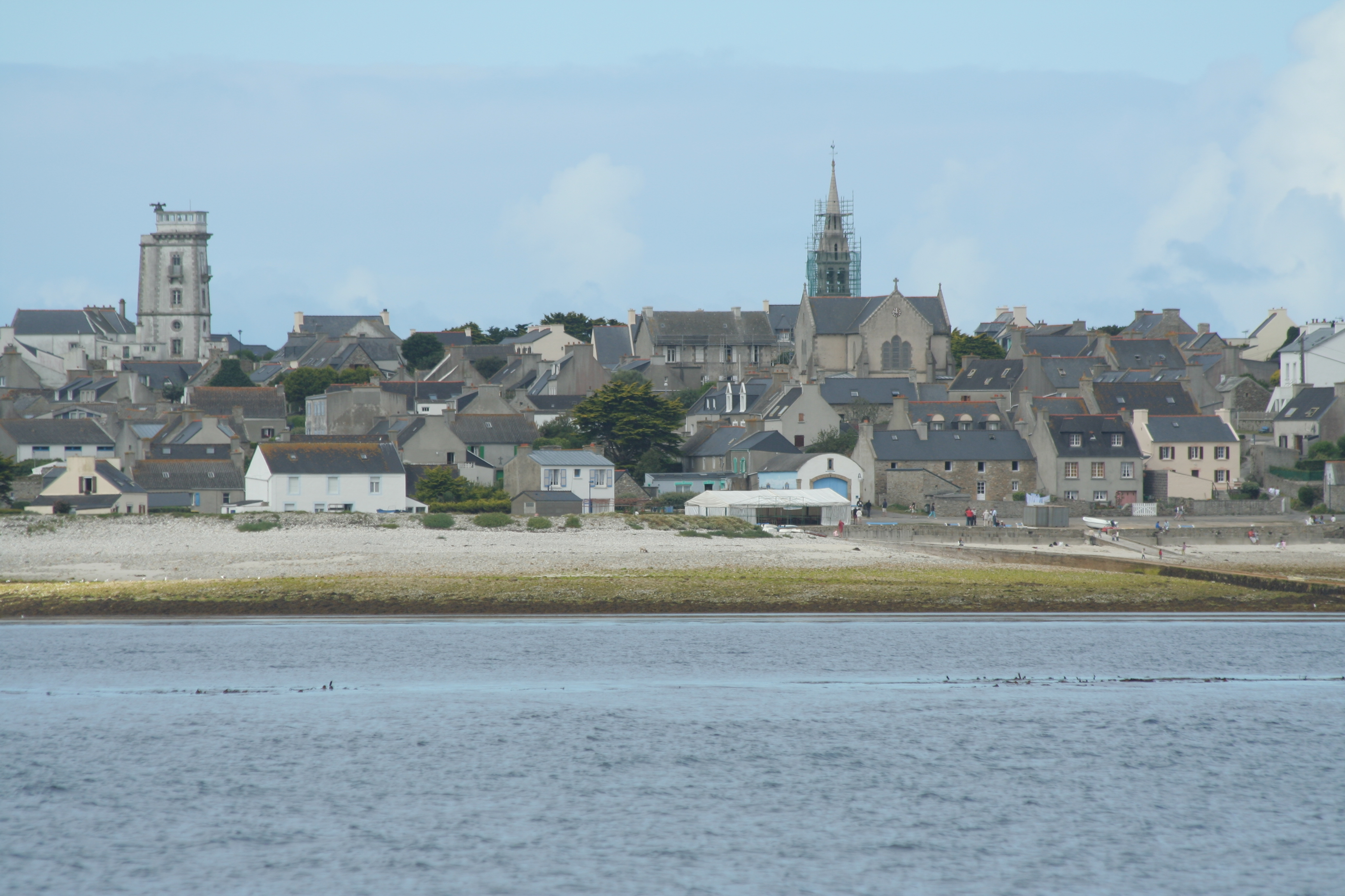 L'île de Molène, vue depuis le nord de la passe de la Chimère. Au premier plan, les algues du rocher Lost ar Goc, puis la grève et le port, avec l'ancien abri du canot de sauvetage, à l'arrière-plan, le village, avec le sémaphore et l'église.